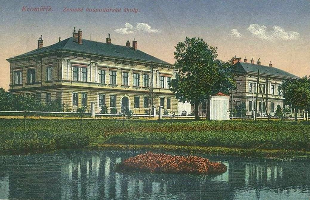 Kroměříž, Koperníkova ulice, Zemské hospodářské školy, nyní Tauferova střední odborna škola, dobová pohlednice, stavba zahájena v roce 1905